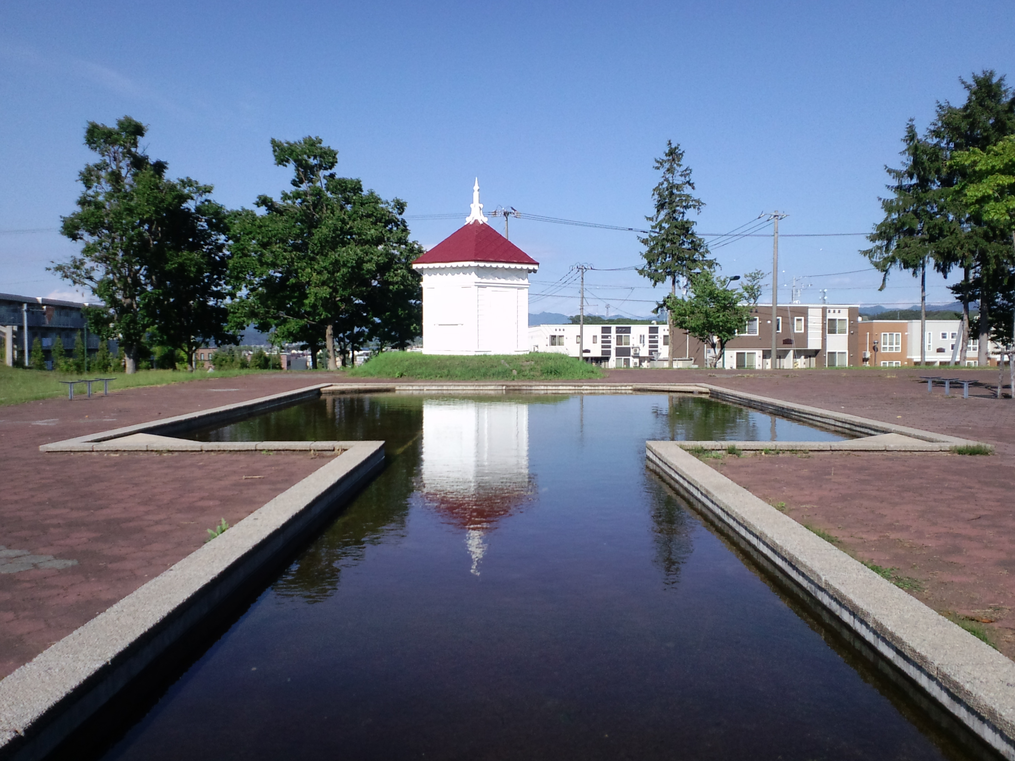 水明公園の親水路